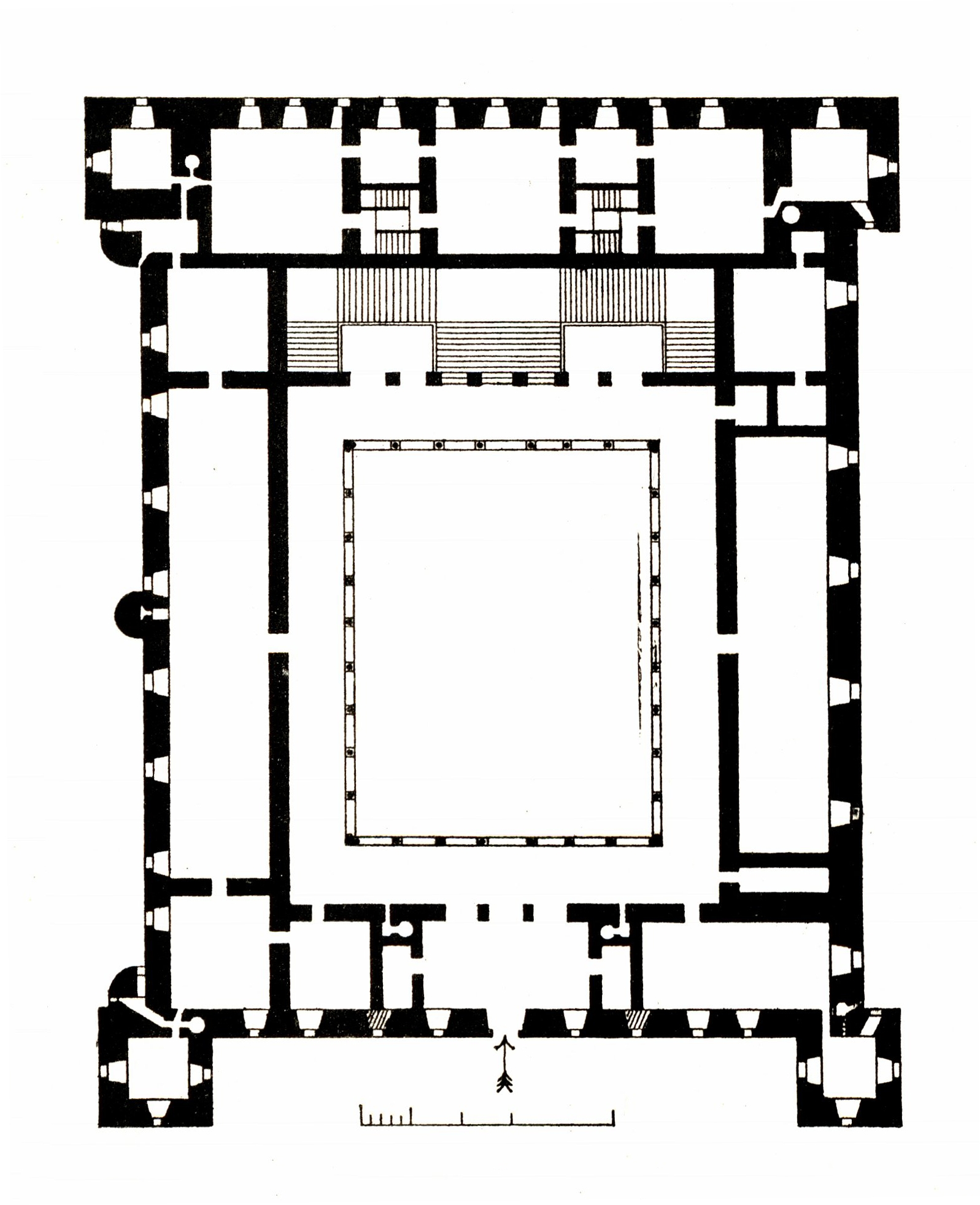 Constantin Uhde, Baudenkmäler in Spanien und Portugal. Aufnahmen einer Reise 1888-1889 Berlin, Verlag von Ernst Wasmuth 1892 Architekt und Professor an der herzoglichen technischen Hochschule in Braunschweig